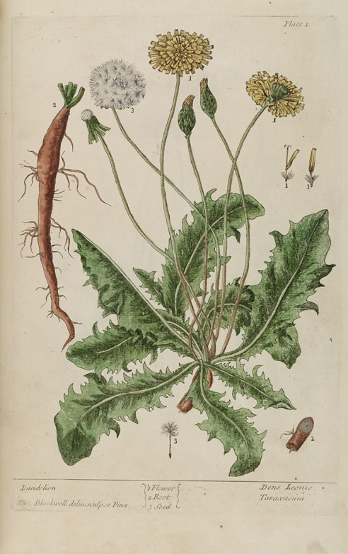 Dens leonis (Loewenzahn)